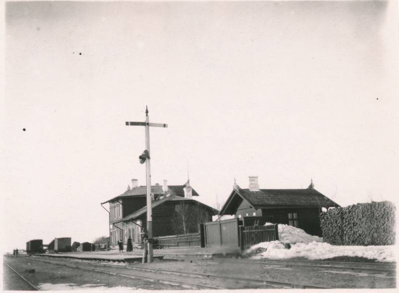 Rakke jaam Tallinn-Tartu raudtee ääres.